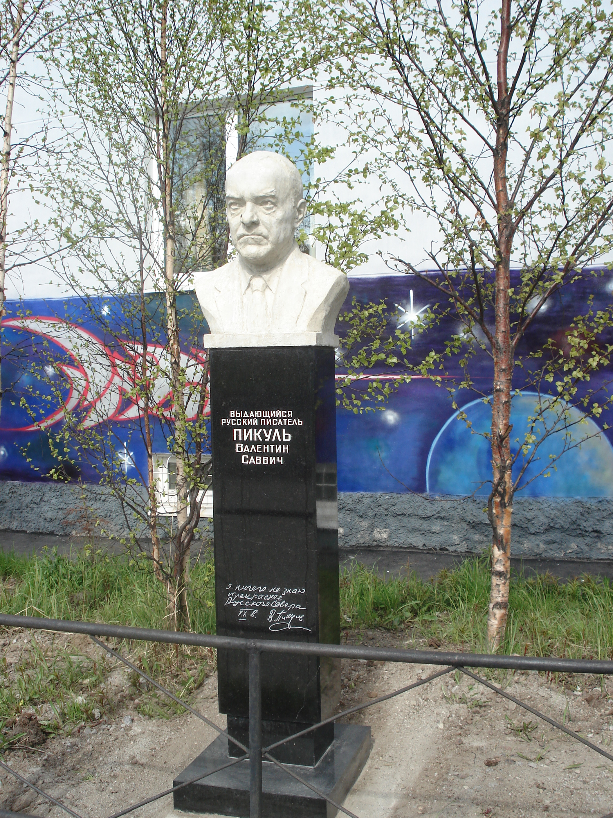 Бюст Пикуля